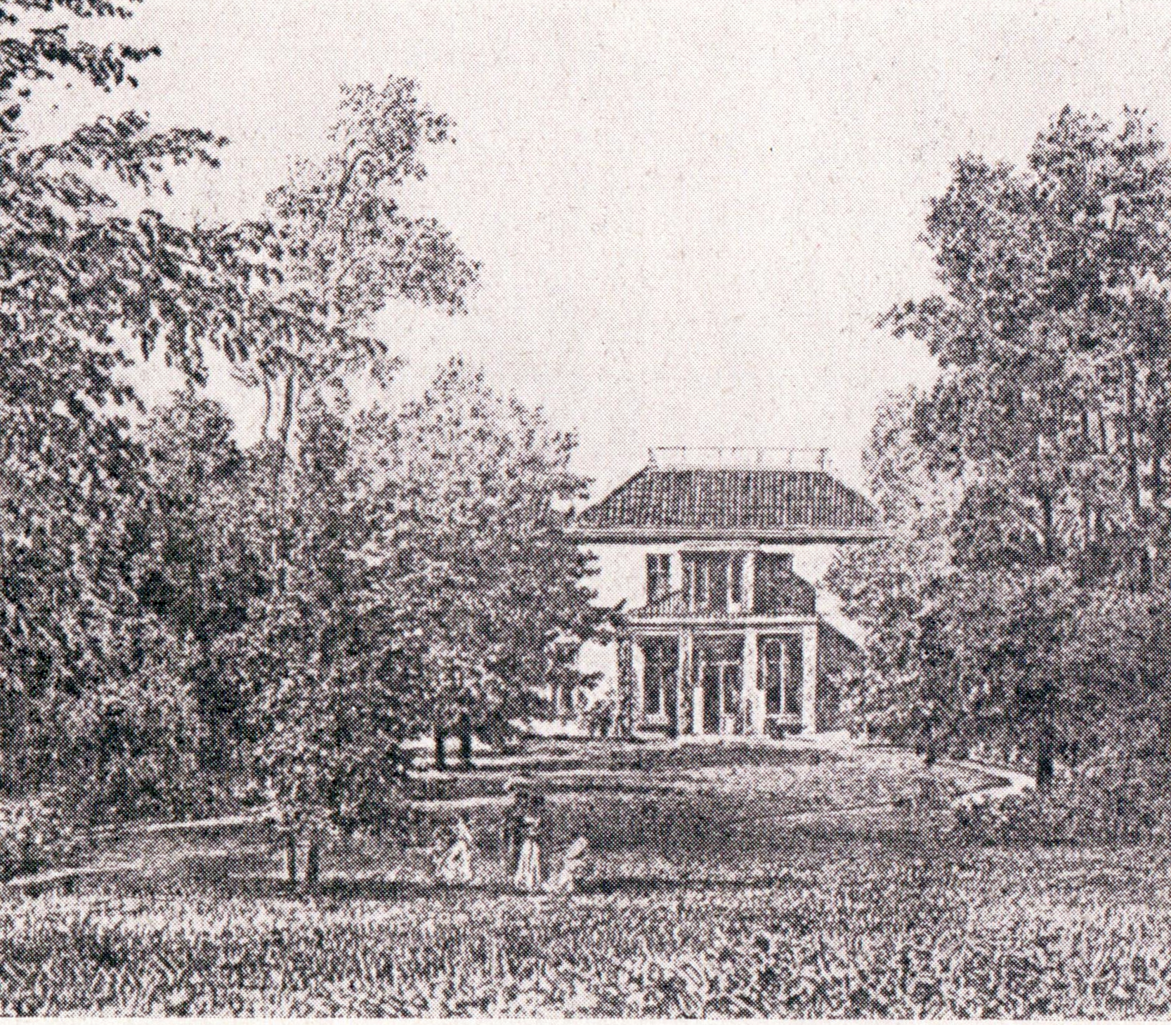 Villa am Harvestehuder Weg, Hamburg; Lithographie von Valentin Ruths: Landhäuser an der Alster - In: Panorama der Landhäuser an der Alster bis nach Harvestehude (1850), S.1; Ausschnitt, hier: Harvestehuder Weg 27